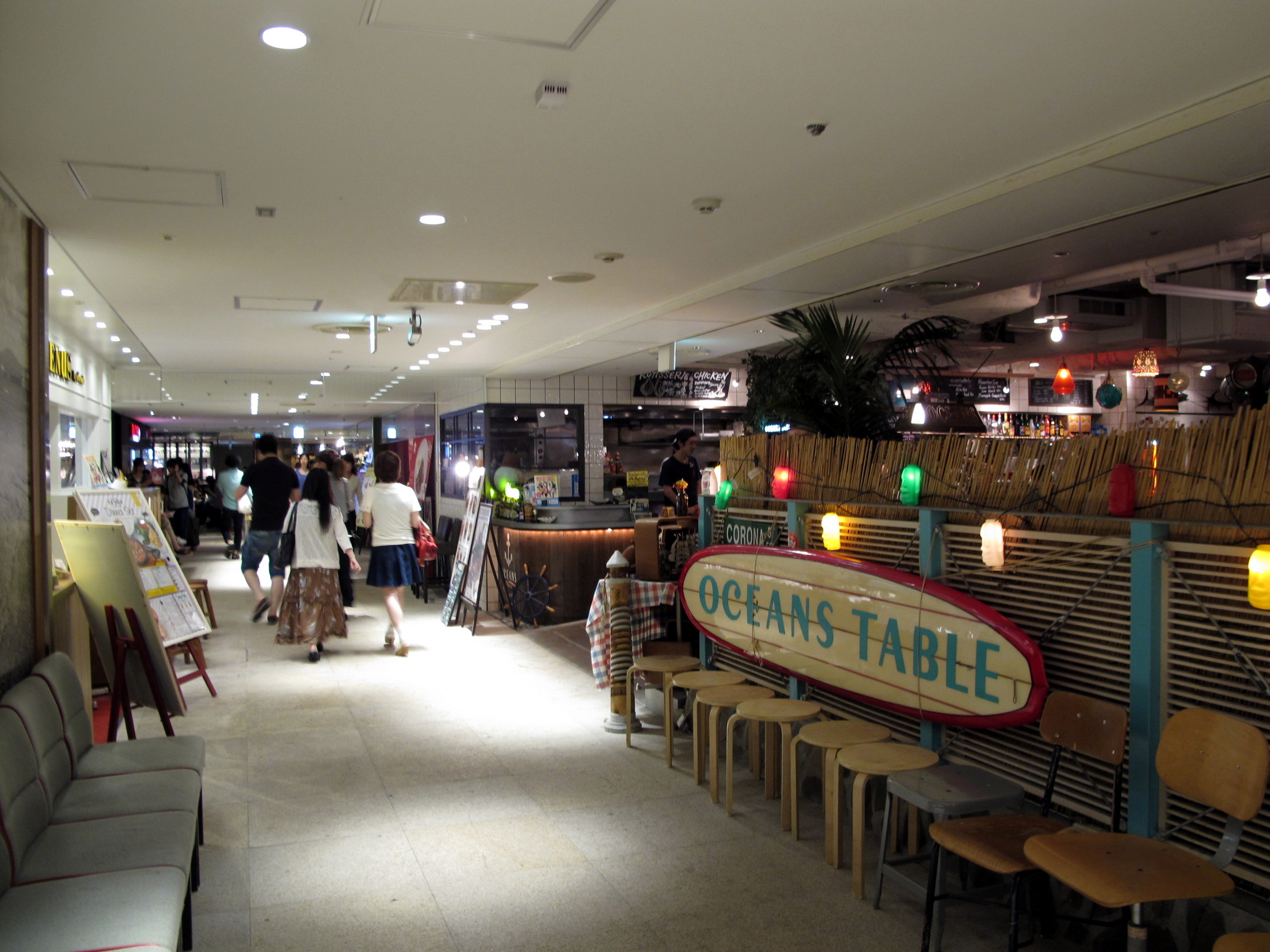 Lumine EST Level 8 Restaurants